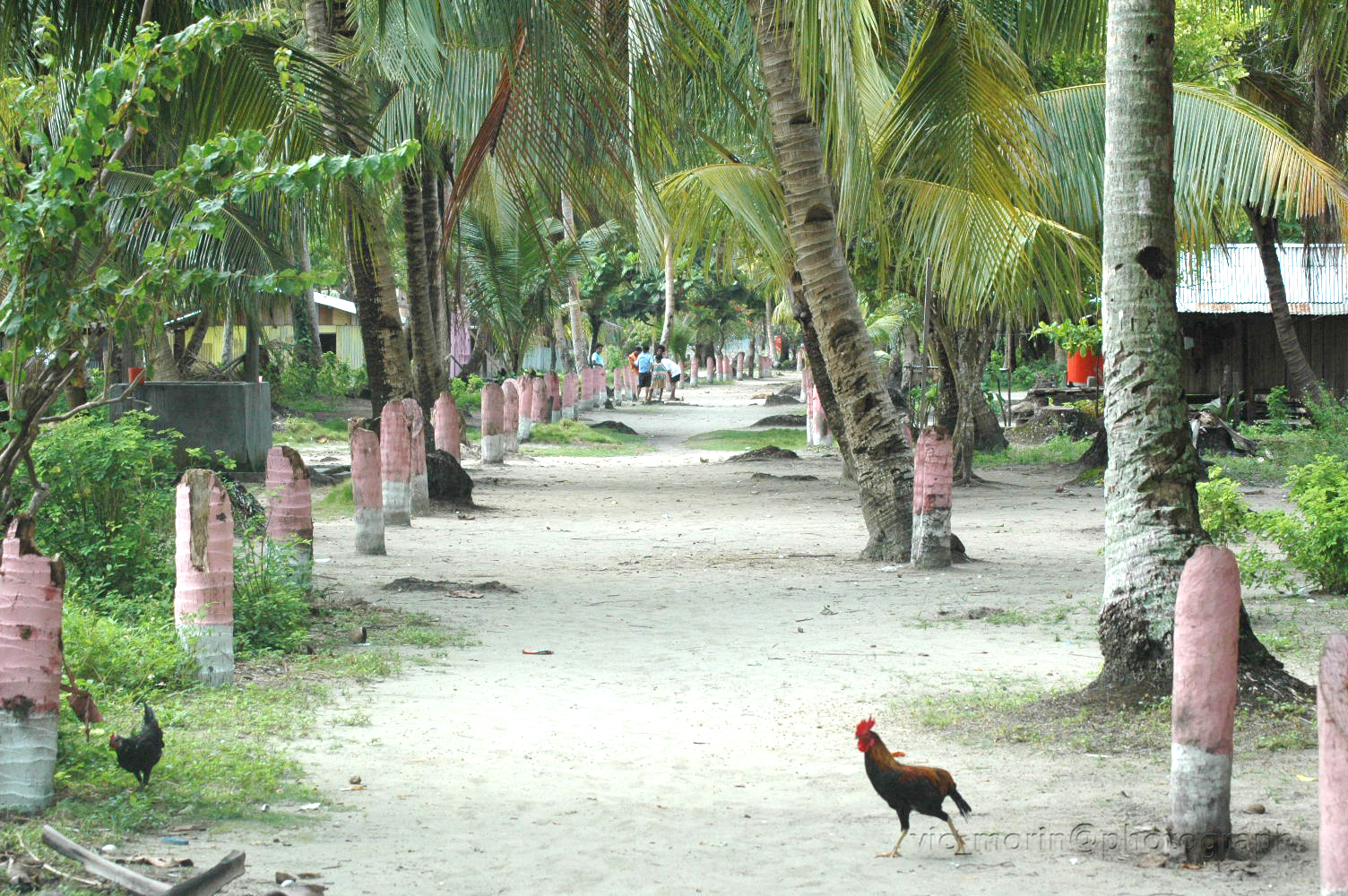 Nusi Island